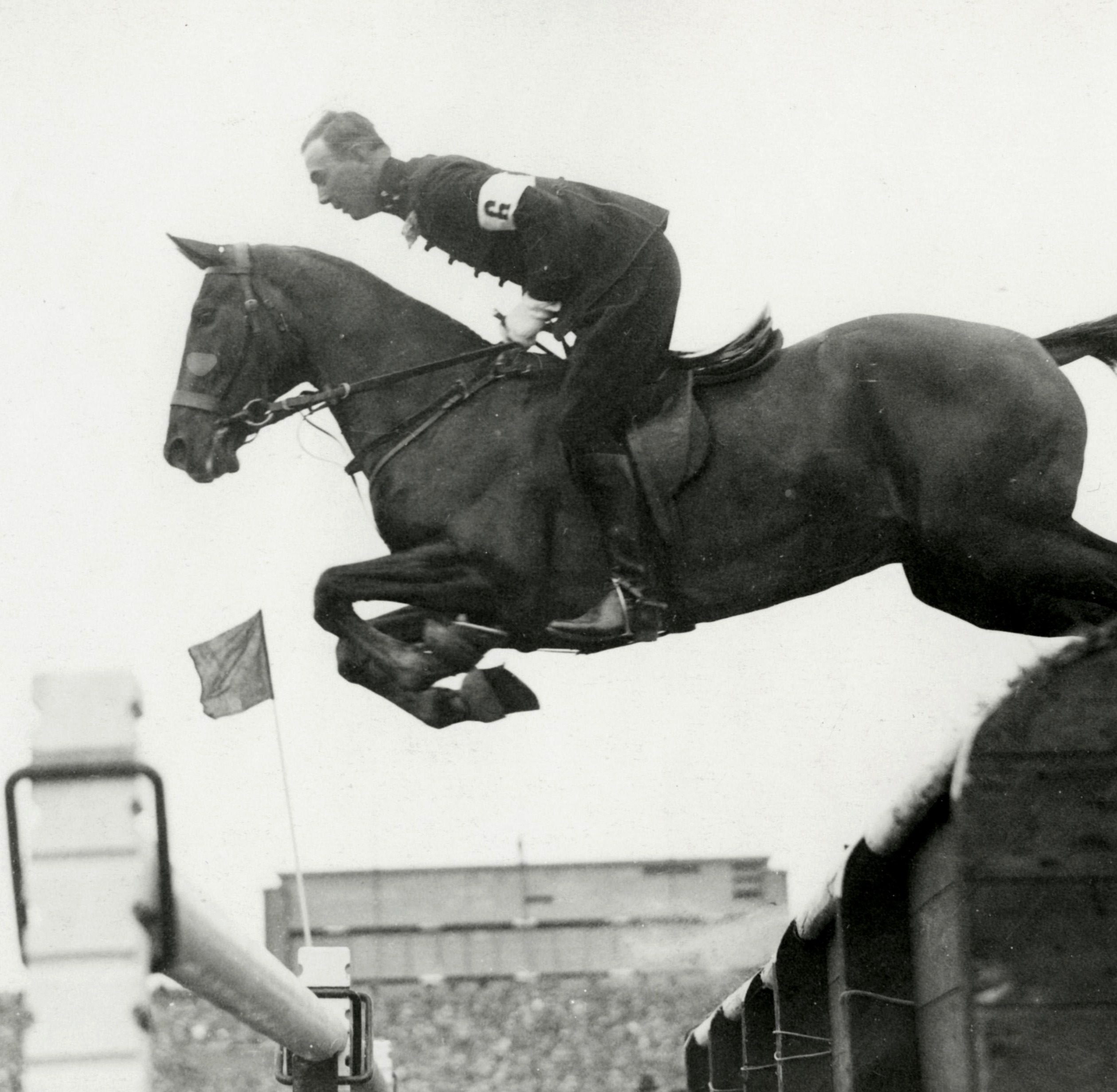 Sport, Olympische Spelen Amsterdam, Nederland 1928: Ritmeester Colenbrander (Nederland) springt met zijn paard Gaga over een hindernis op het onderdeel jumping.